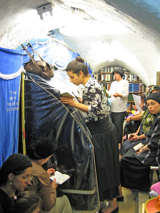 Nebi Samuel interior